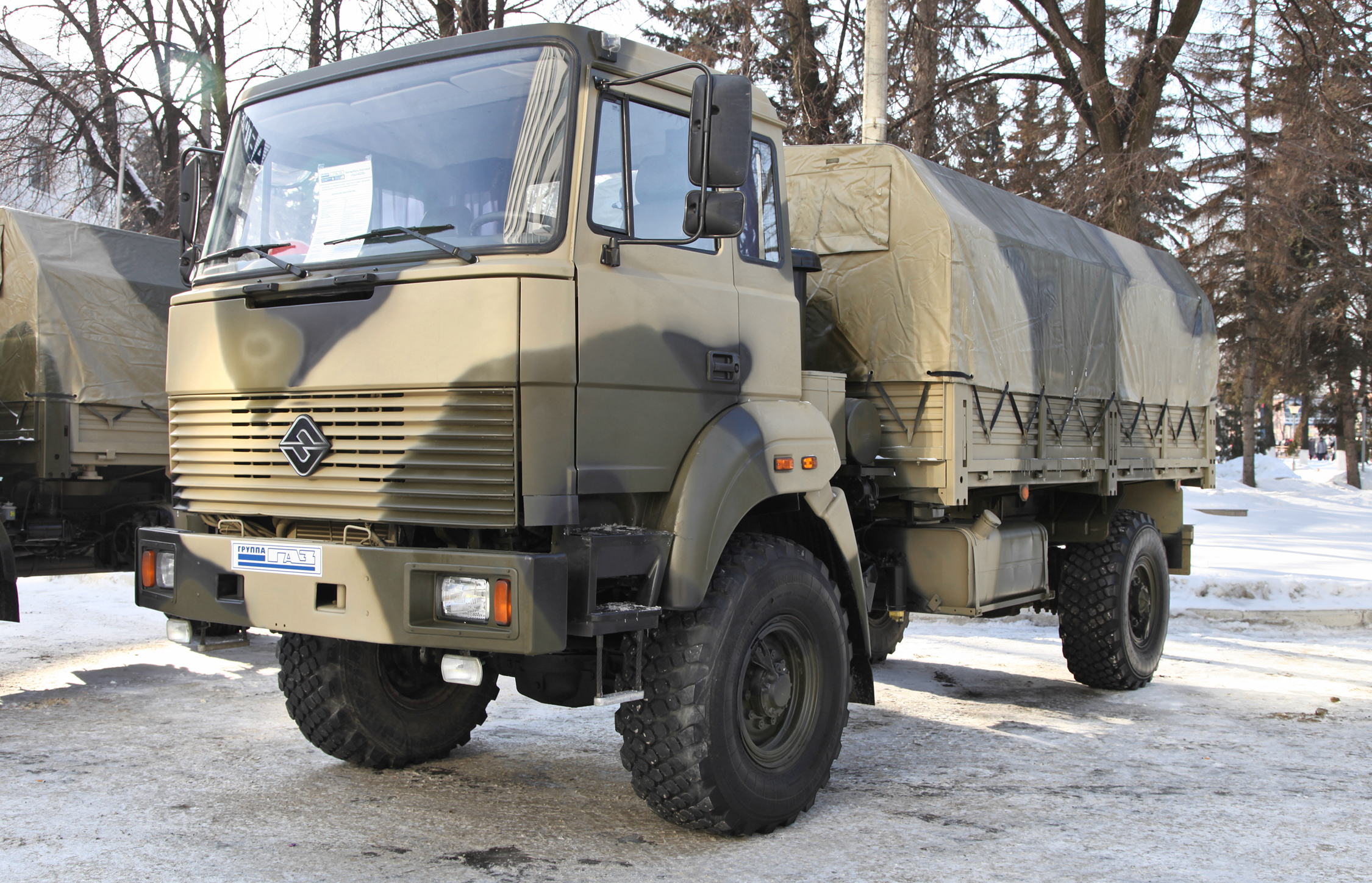 Бескапотный вариант Урал-43206 (Ural-43206 variant without the hood)